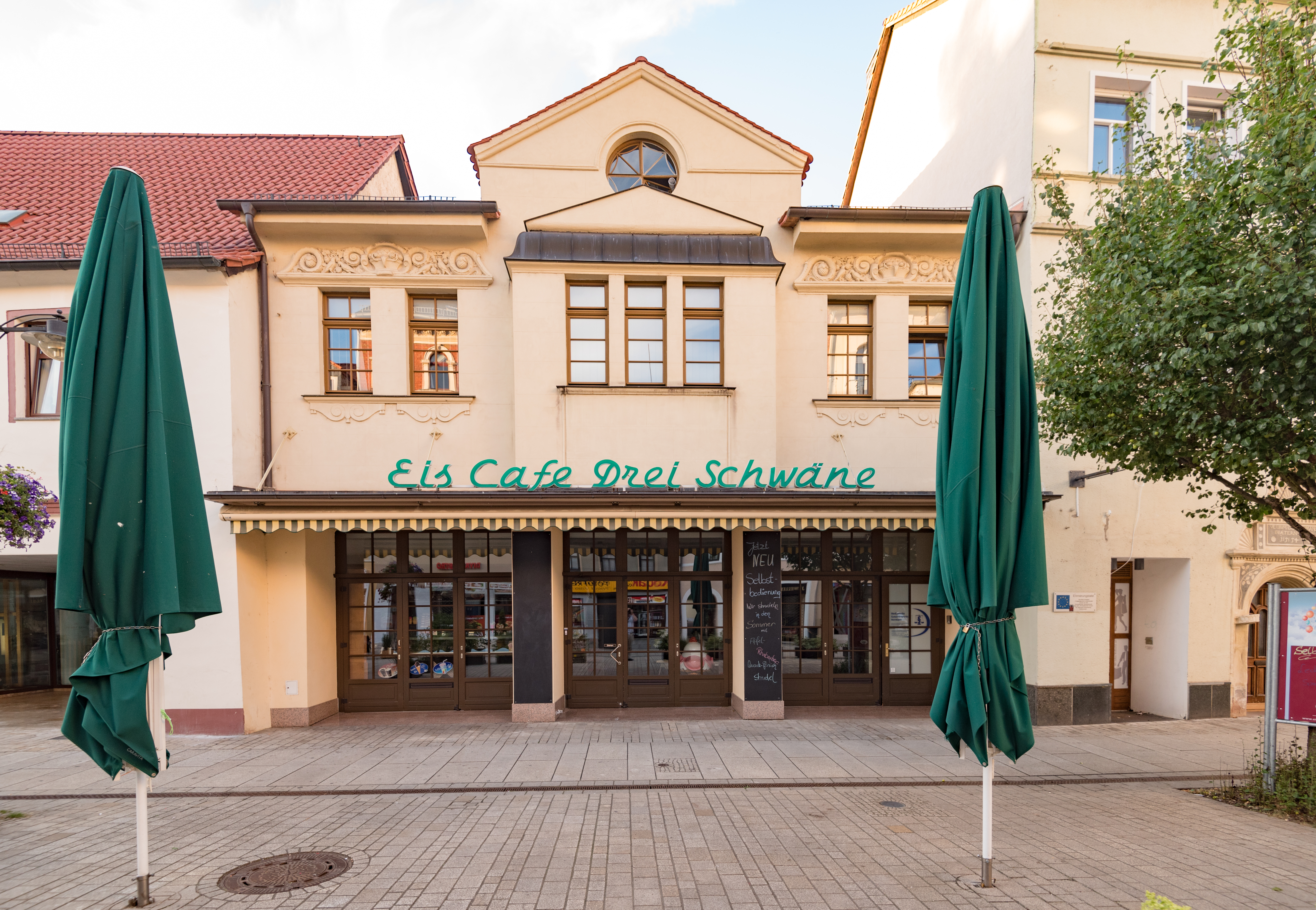 Weißenfels, Jüdenstraße 21